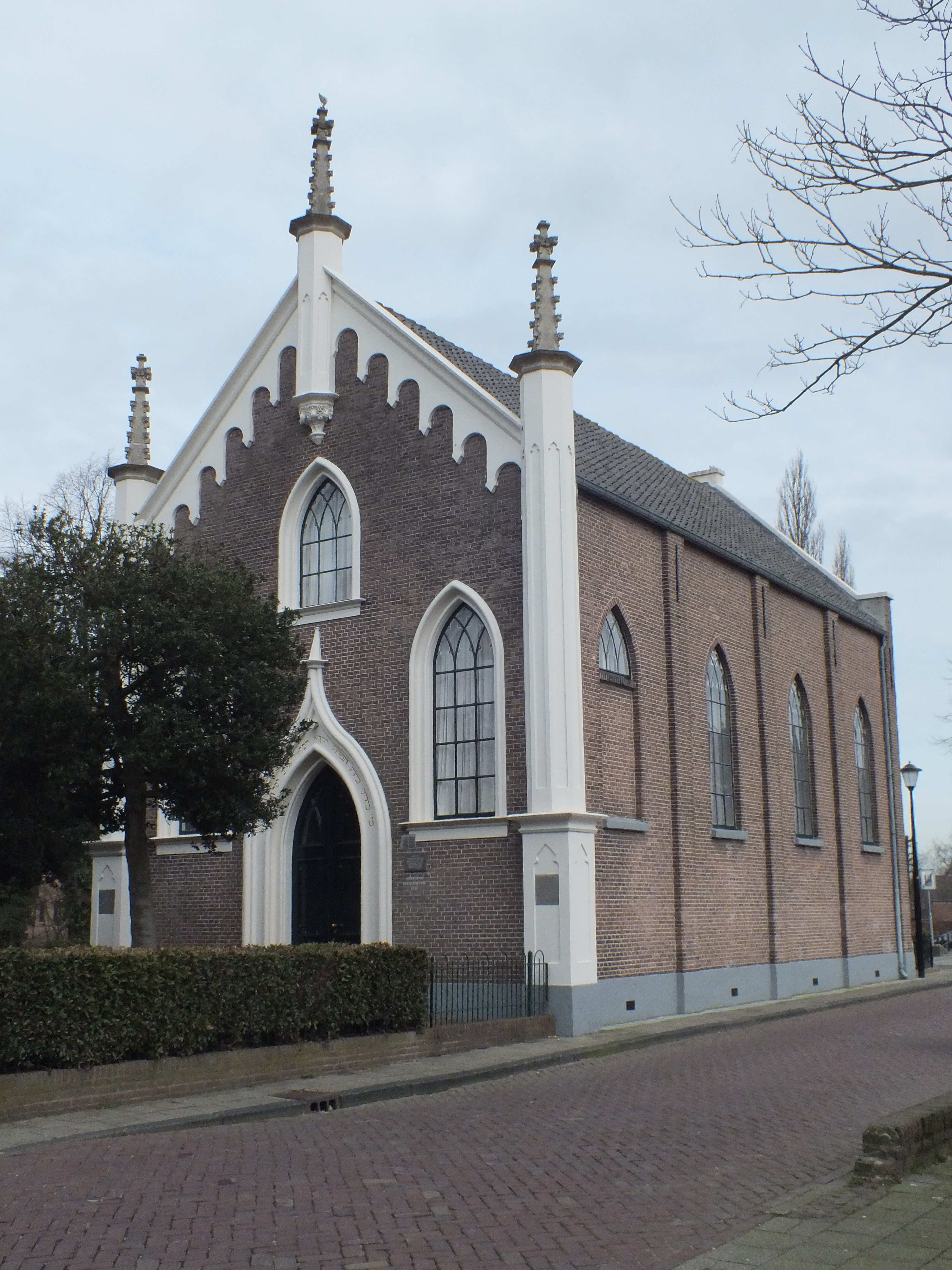 Zicht op een deel van de voormalige synagoge Culemborg nabij het centrum van Culemborg